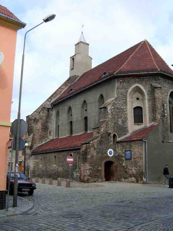 Dzierżoniów - Kościół Niepokalanego Poczęcia NMP Autor: Lzur